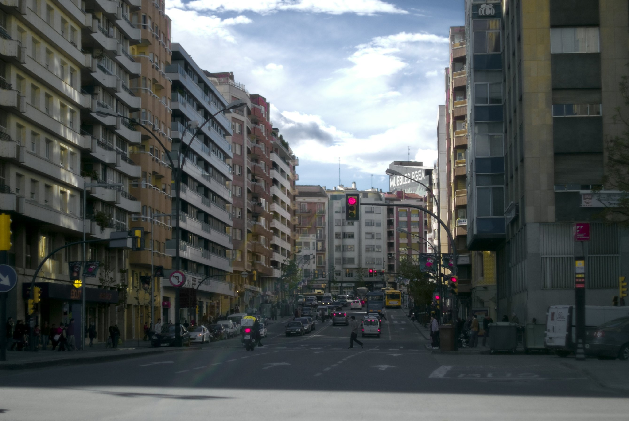 L'Avinguda de Catalunya de Lleida Tengo que sacar esta foto de noche. He dicho. Desaturada por colores, adivinad cuales están saturados y cuales desaturados.